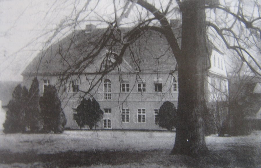 Manoir de Podlesie (Kunsdorf) en Silésie. Podlésie depuis 1945.